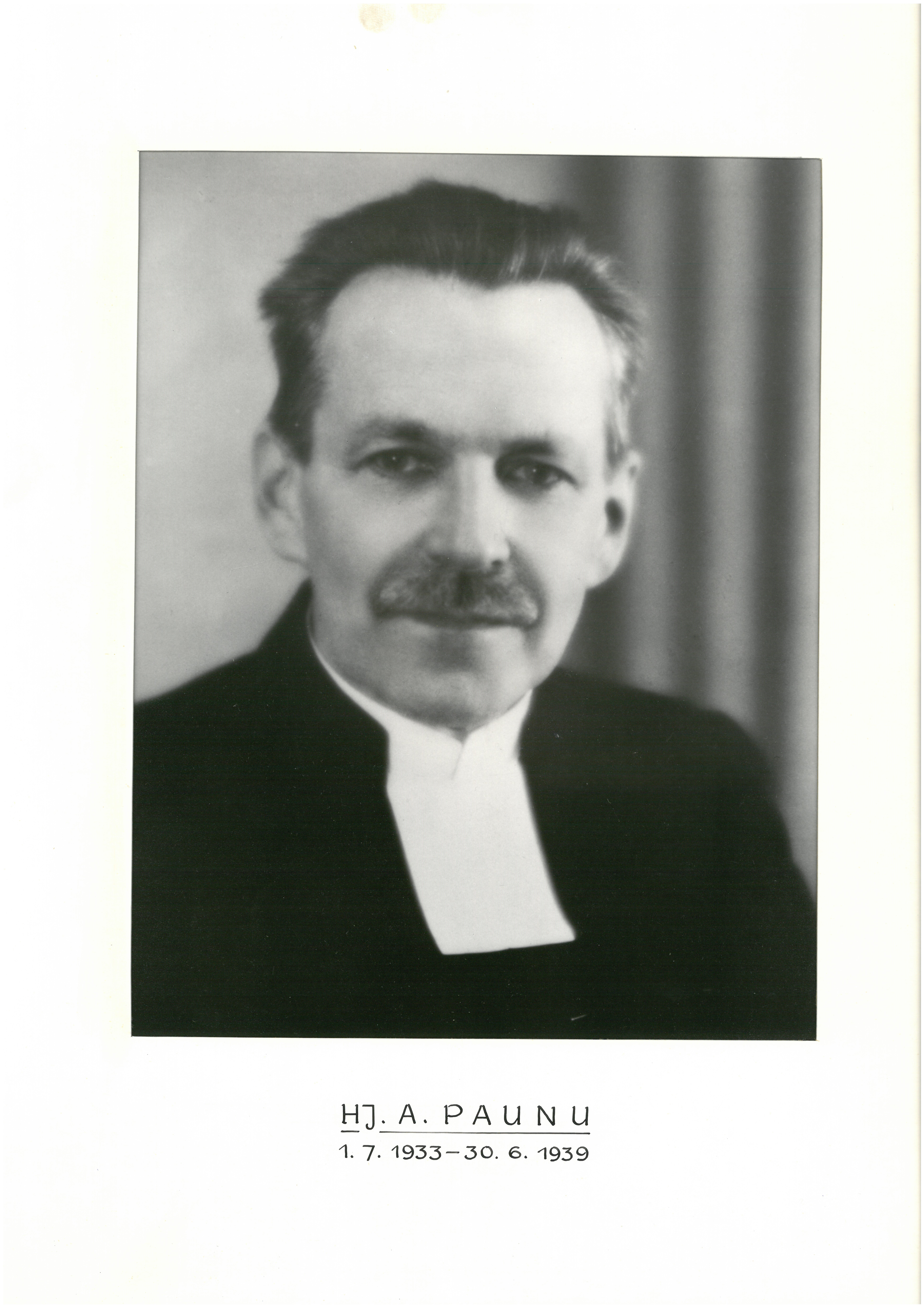 Pappisasessorina Tampereen tuomiokapitulissa vuosina 1933-39. Kuva Tampereen hiippakunnan arkistosta